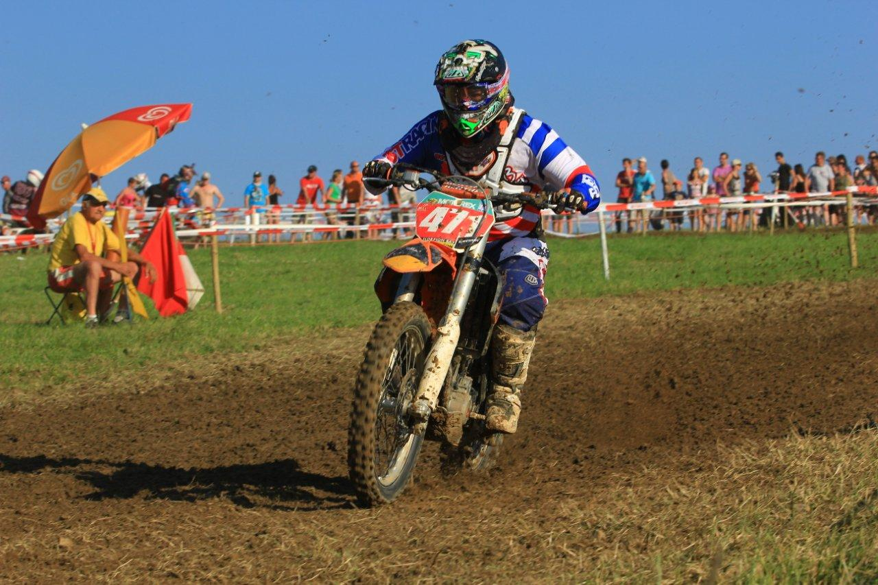 De Gilles Hermes um Cross zu Gesves 2013